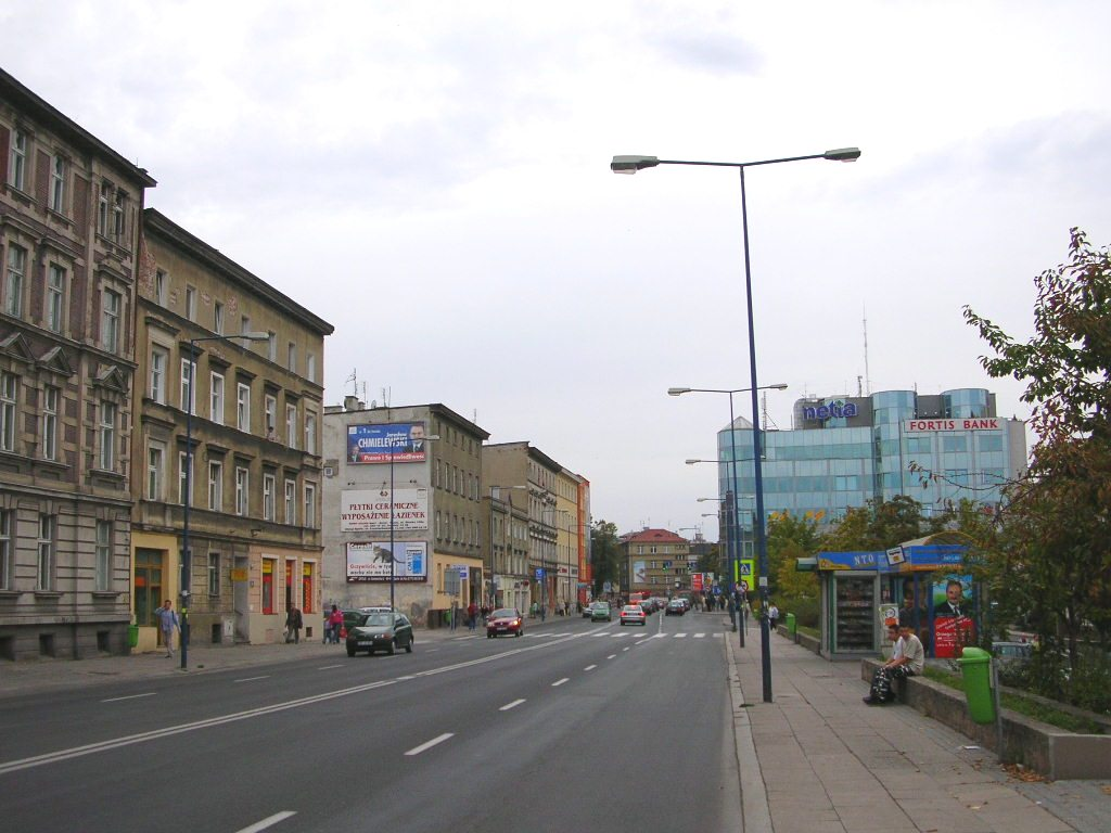 Opole - ul.Ozimska Autor - Bartek Wawraszko ( Bast )